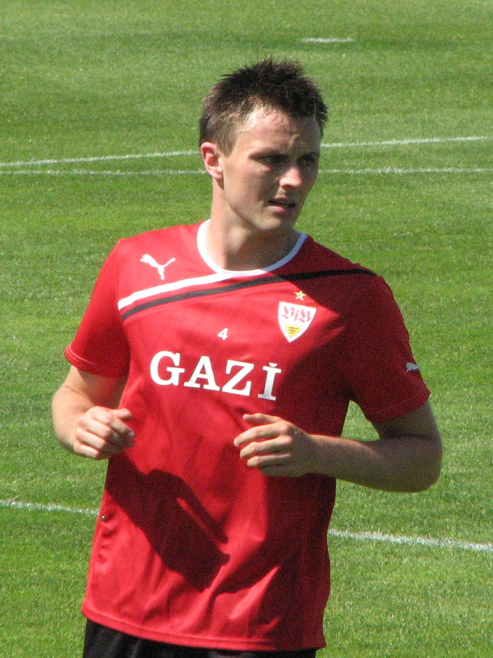 William Kvist beim VfB Training am 28.06.11. Aufgenommen von